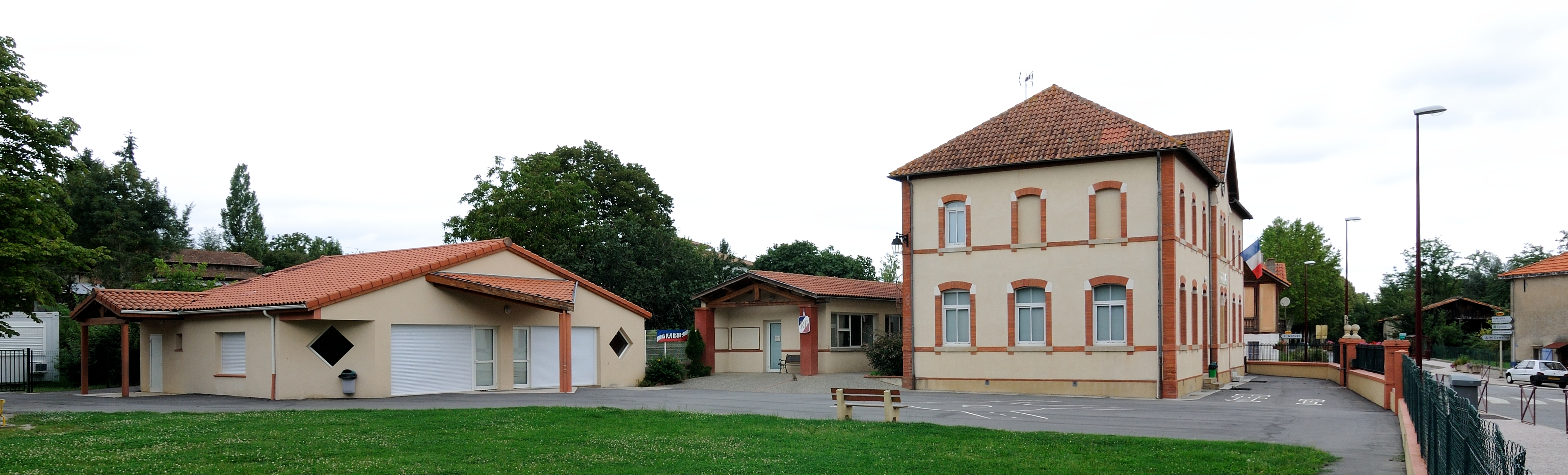 Mairie et école d'Escosse (Ariège - France)